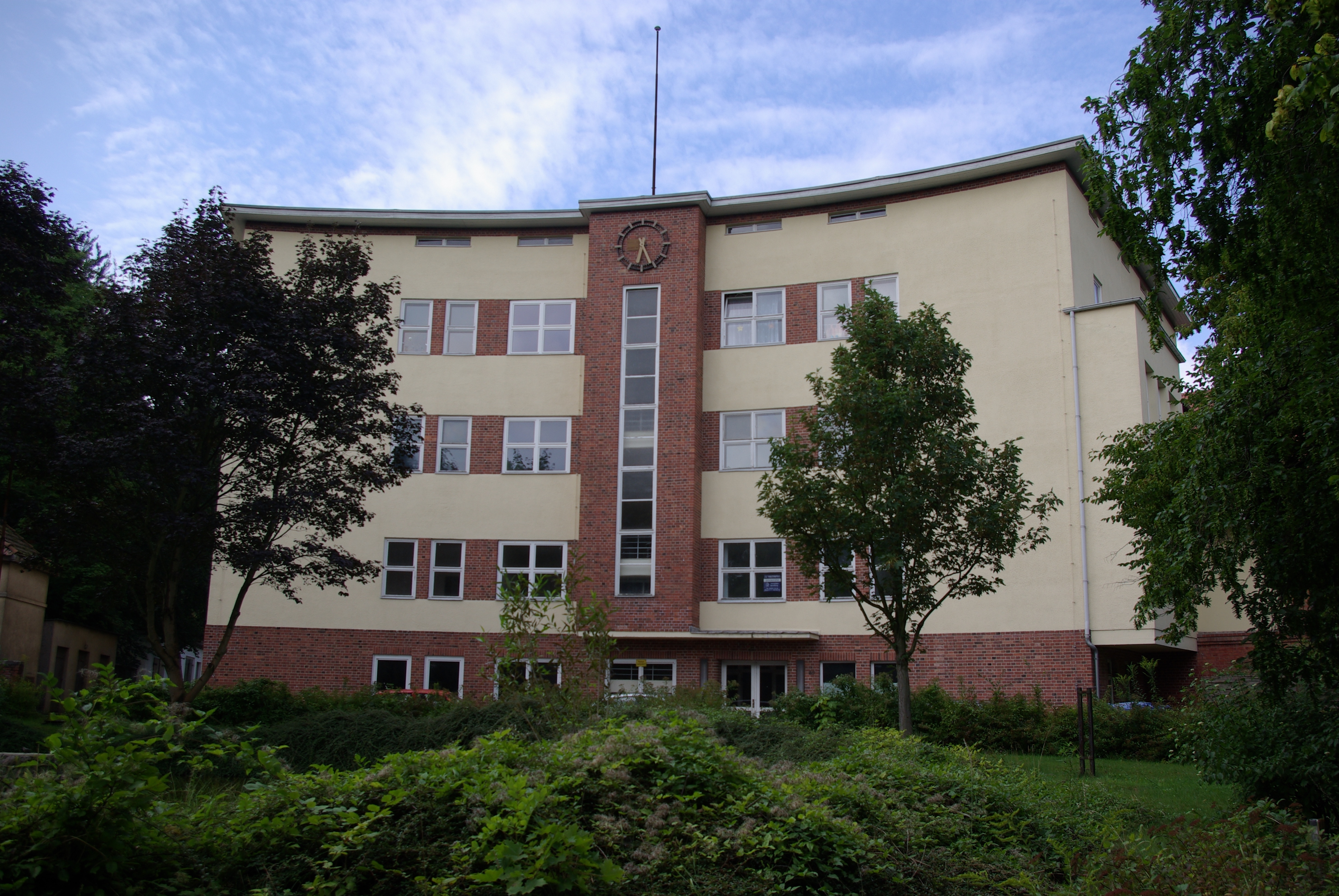 Bad Freienwalde in Brandenburg. Das haus in der Berlin Straße 29 war mal ein Krankenhaus. Das Haus steht unter Denkmalschutz.